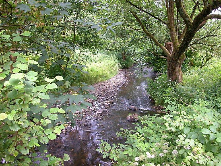 Bei Breidenmühle.